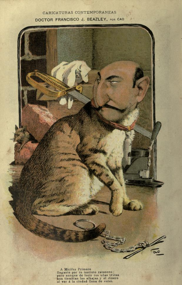 Doctor Francisco Julián Beazley